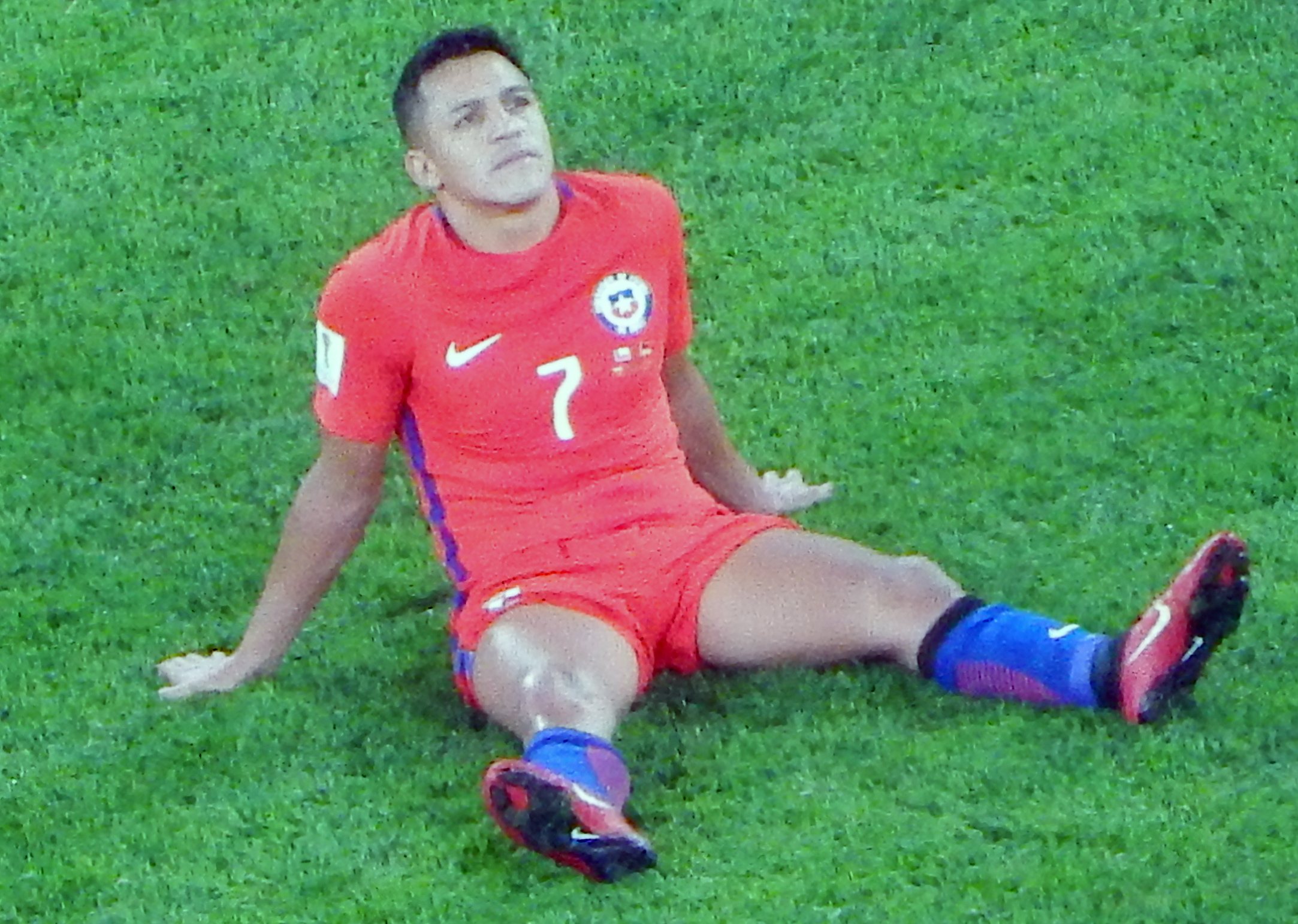 Финал Кубка конфедераций 2017